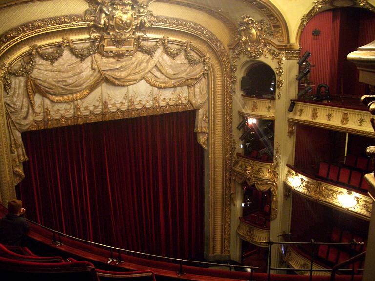 Bern, Switzerland: Stadttheater